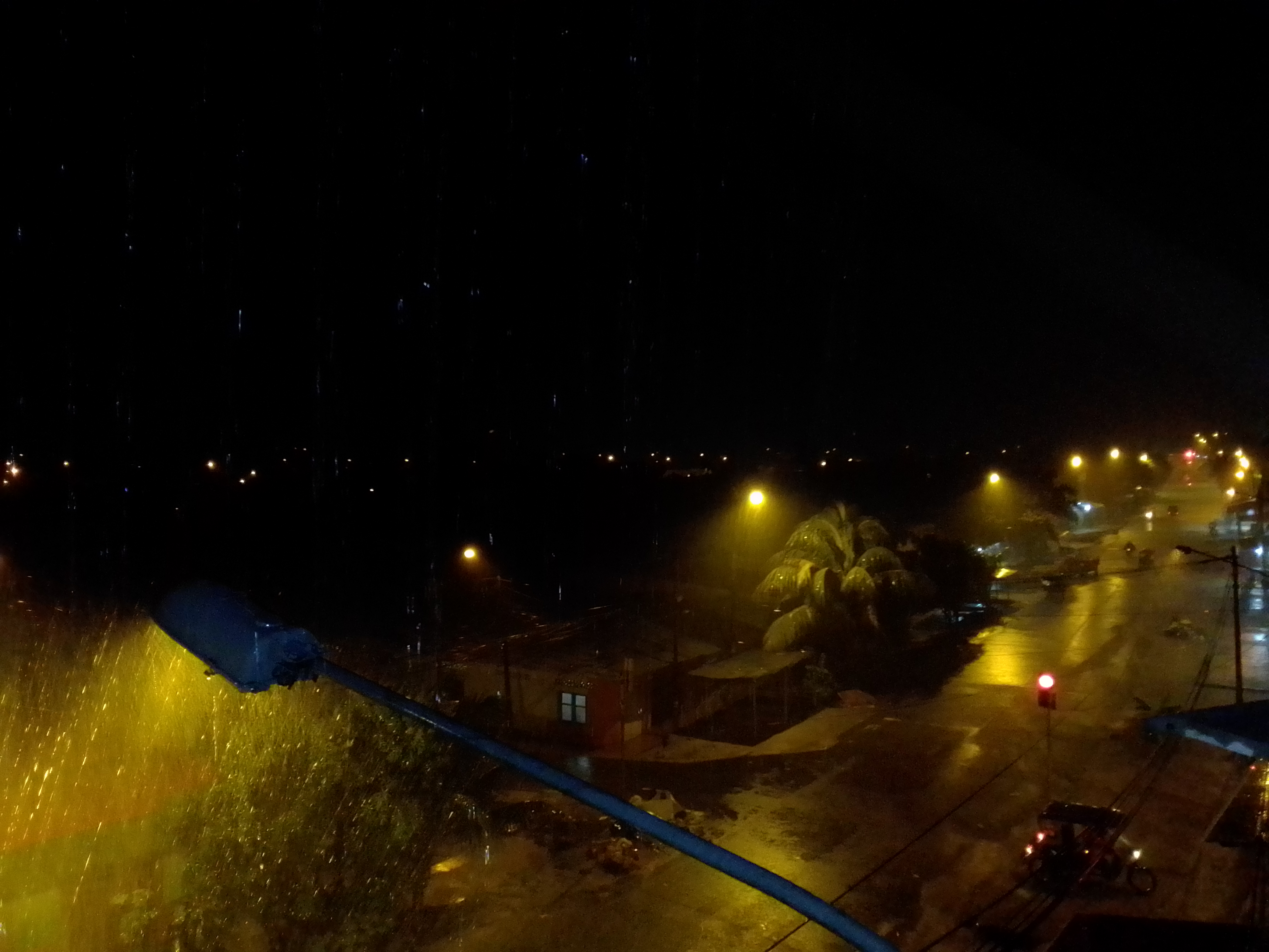 Lluvias en Iquitos